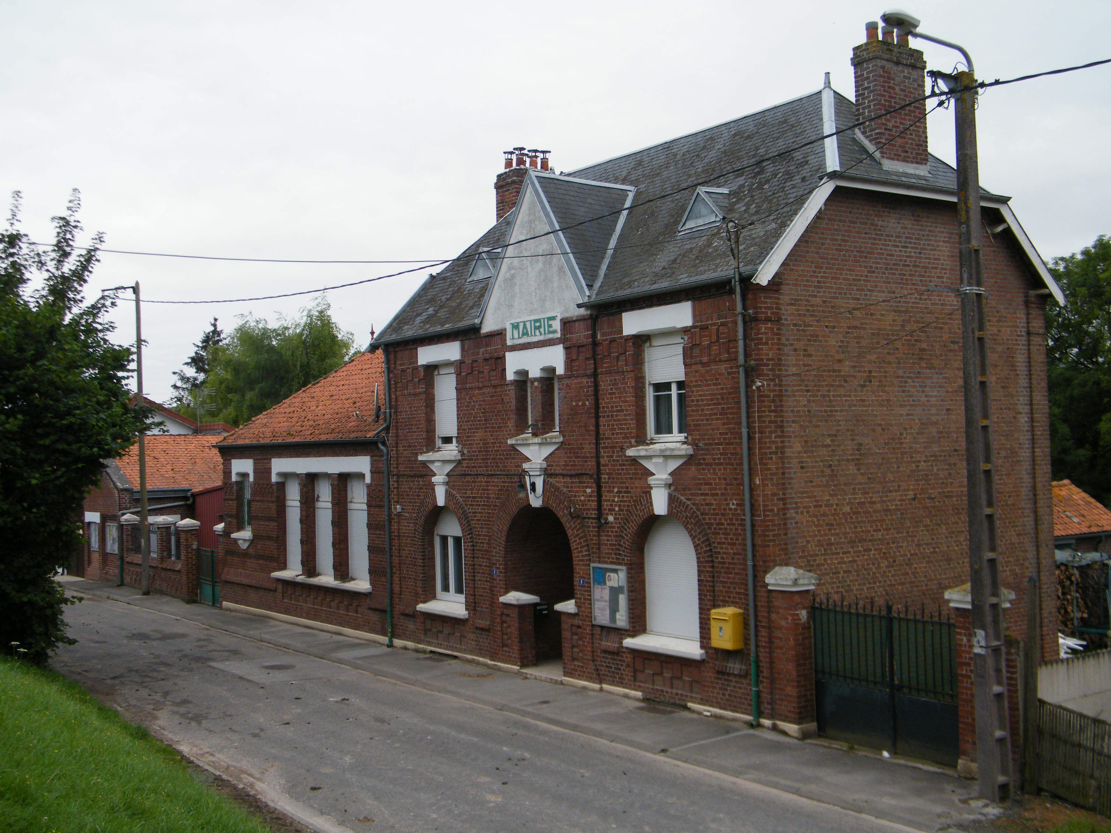 Mairie-école.